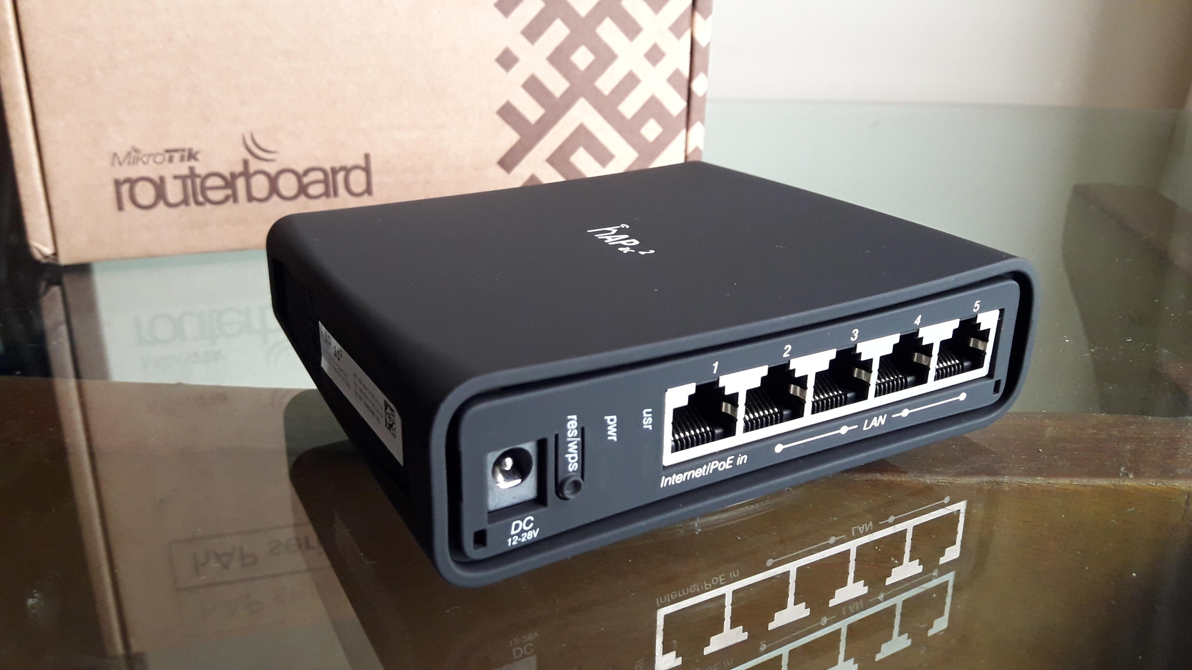 Router MikroTik RBD52G-5HacD2HnD-TC